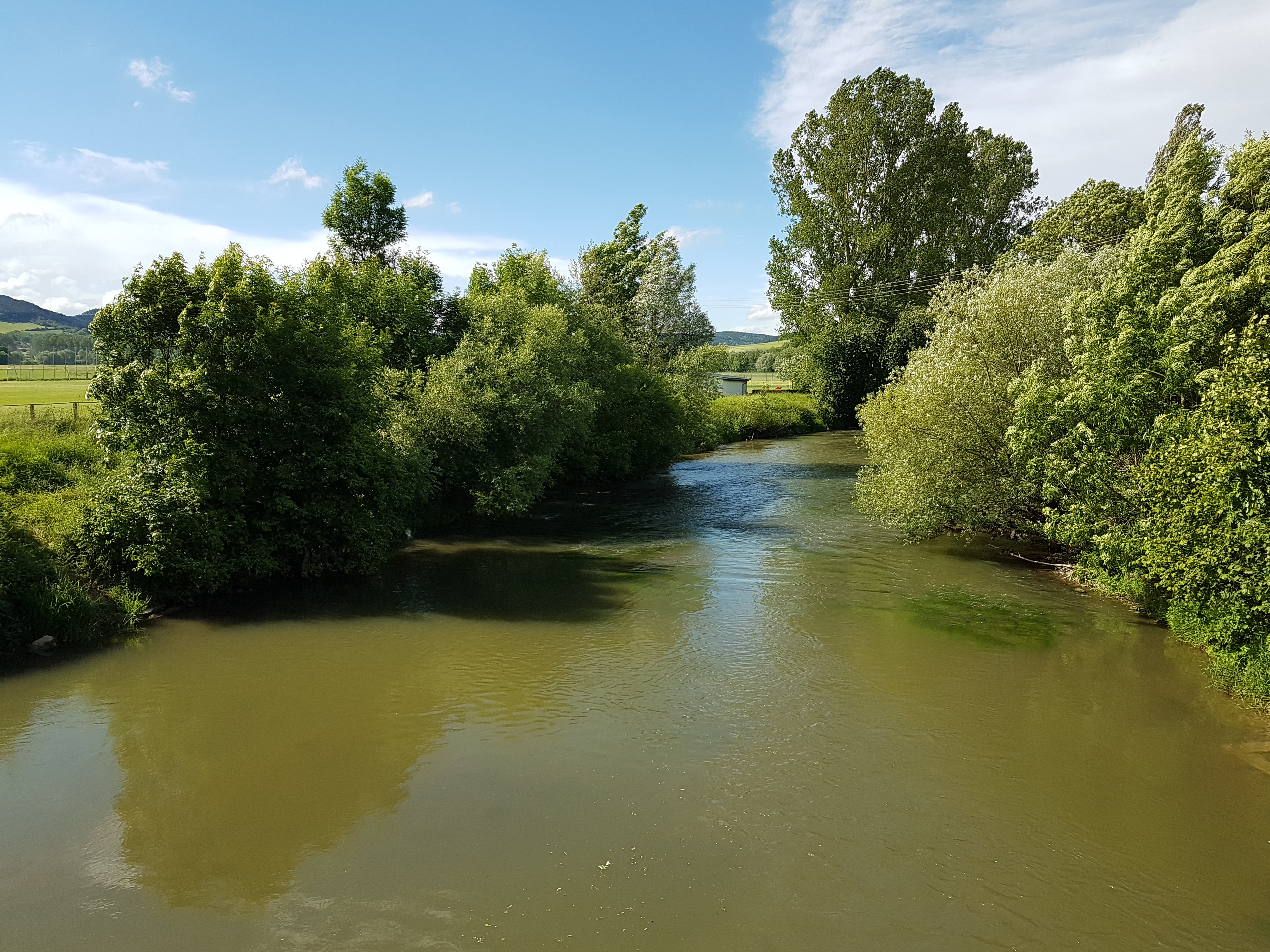 Blick von der Tauberbrücke in Impfingen auf die Tauber in Richtung Hochhausen und Werbach